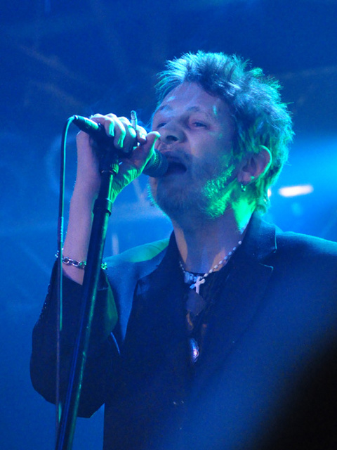 Shane MacGowan, Milk club, Moskau, 29.08.2010 mit den Pogues